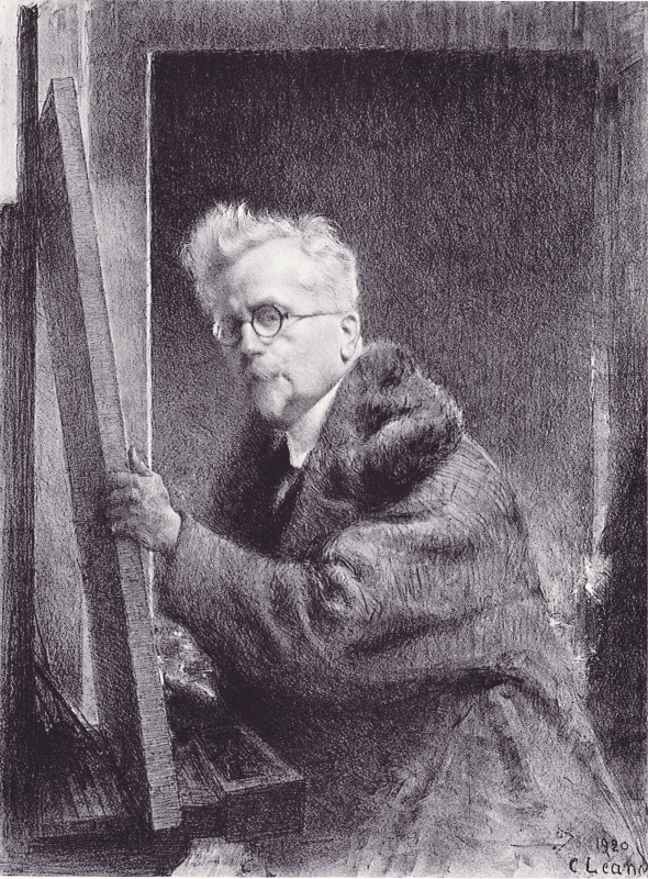 Autoportrait - Lithographie originale Galerie : Musée de Condé sur Noireau (France)